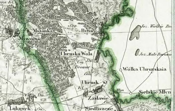 Wola Uhruska na mapie topograficznej Królestwa Polskiego z 1839 roku